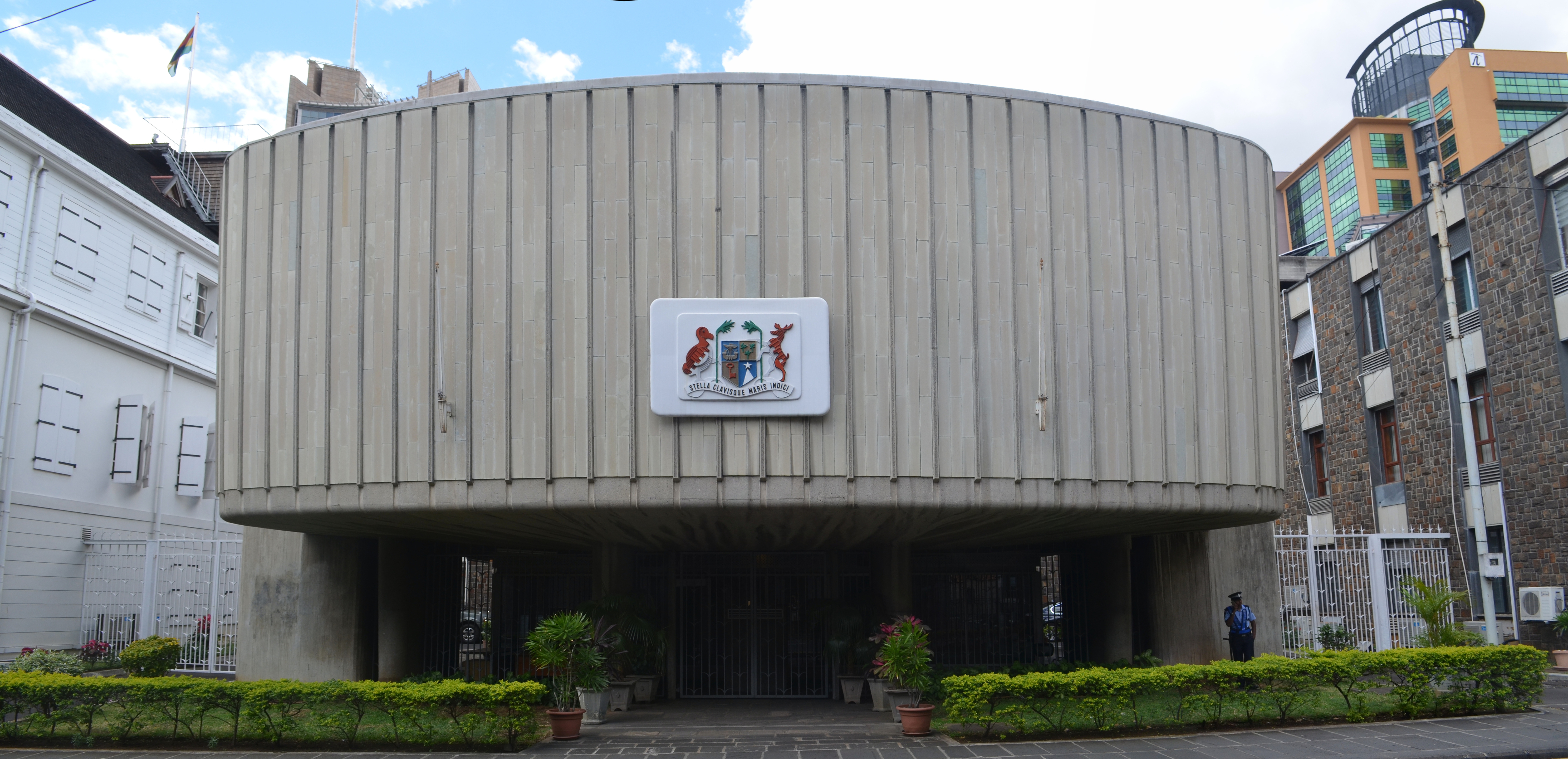 Port Louis, Parliament Building